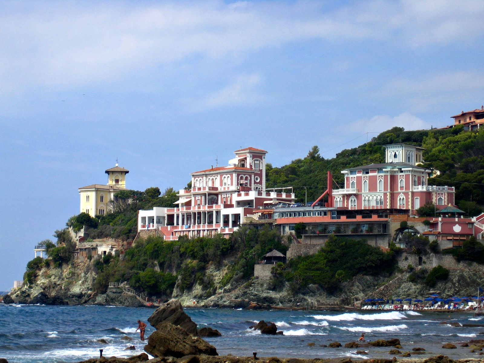 Castiglioncello, Rosignano Marittimo, Toscana, Italiacastiglioncello promontory